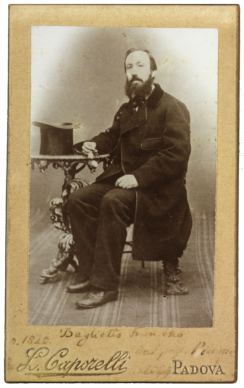 Ritratto fotografico di Francesco Baglietto nell'ultimo decennio del XIX secolo. [Dall'Iconoteca dei botanici, in Phaidra]